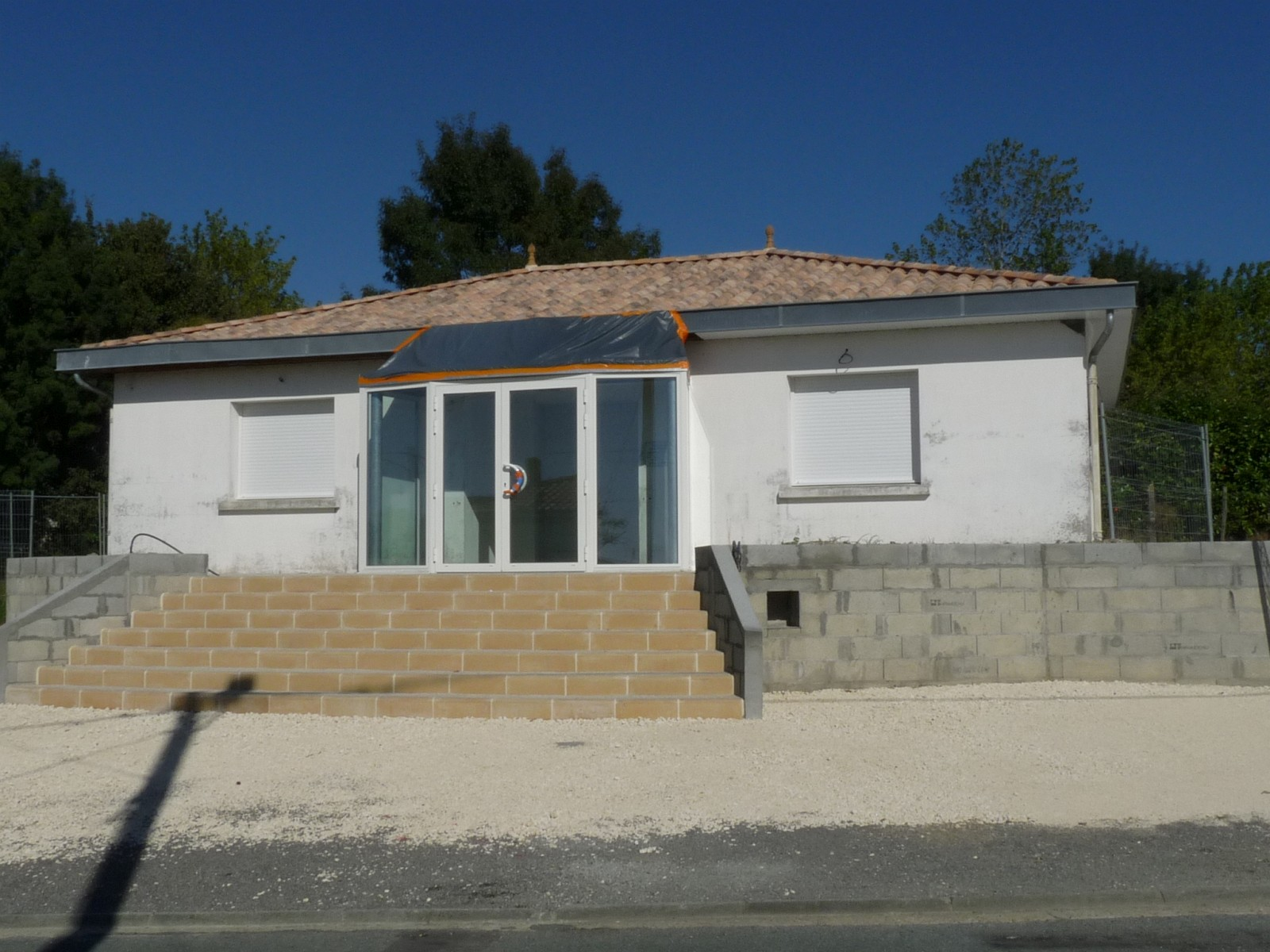 Mairie de Chamouillac (en construction), Charente-Maritime, France